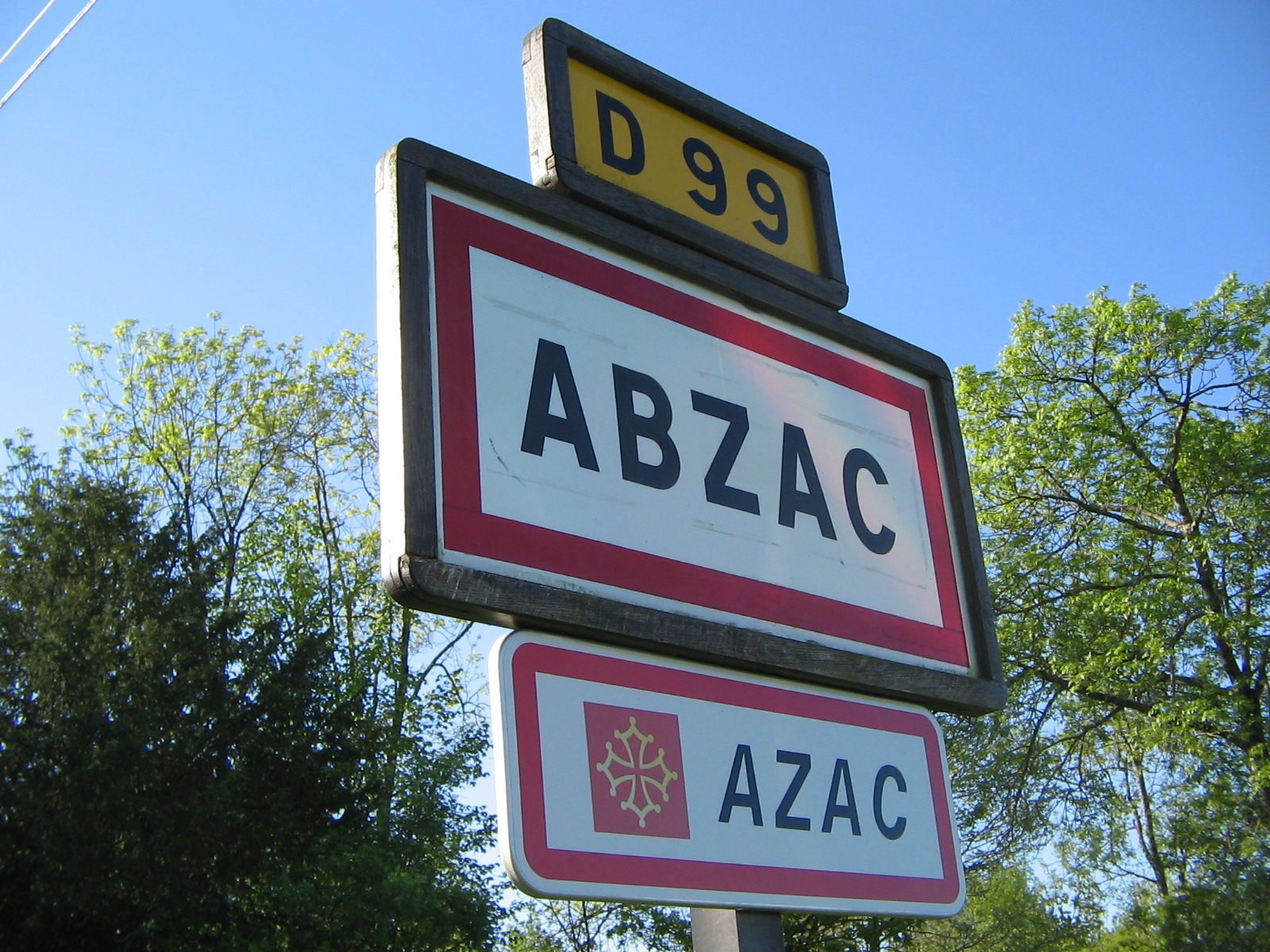 Le panneau d'Abzac (16) en avril 2011